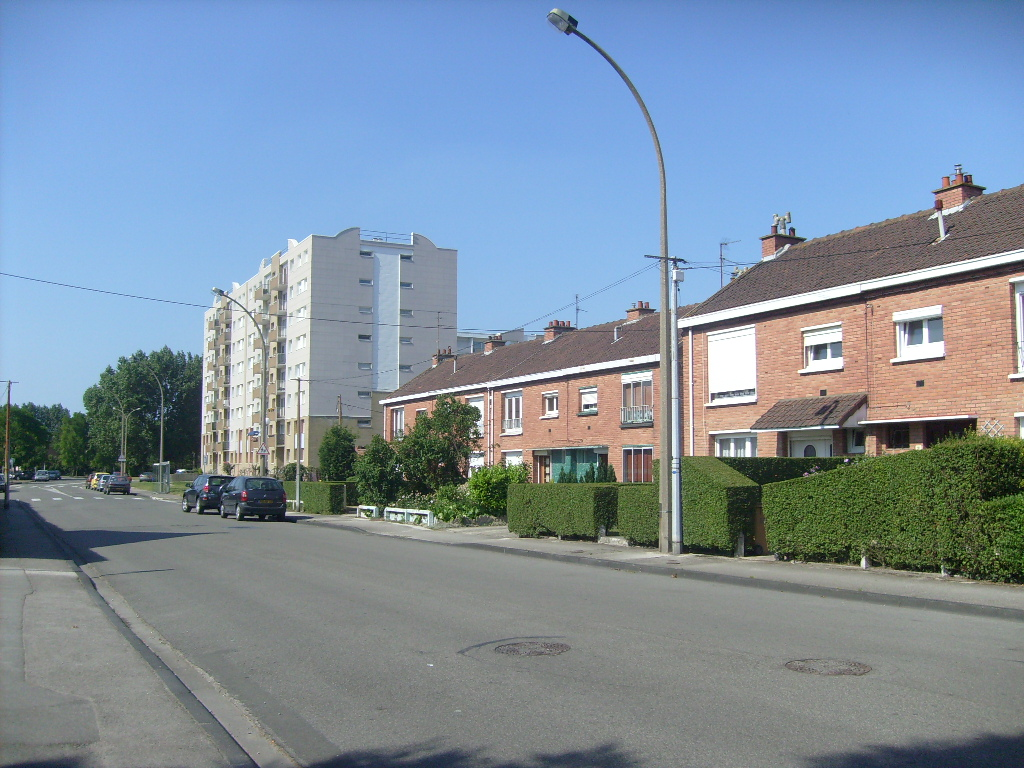 Quartier de la Concorde à Petite-Synthe